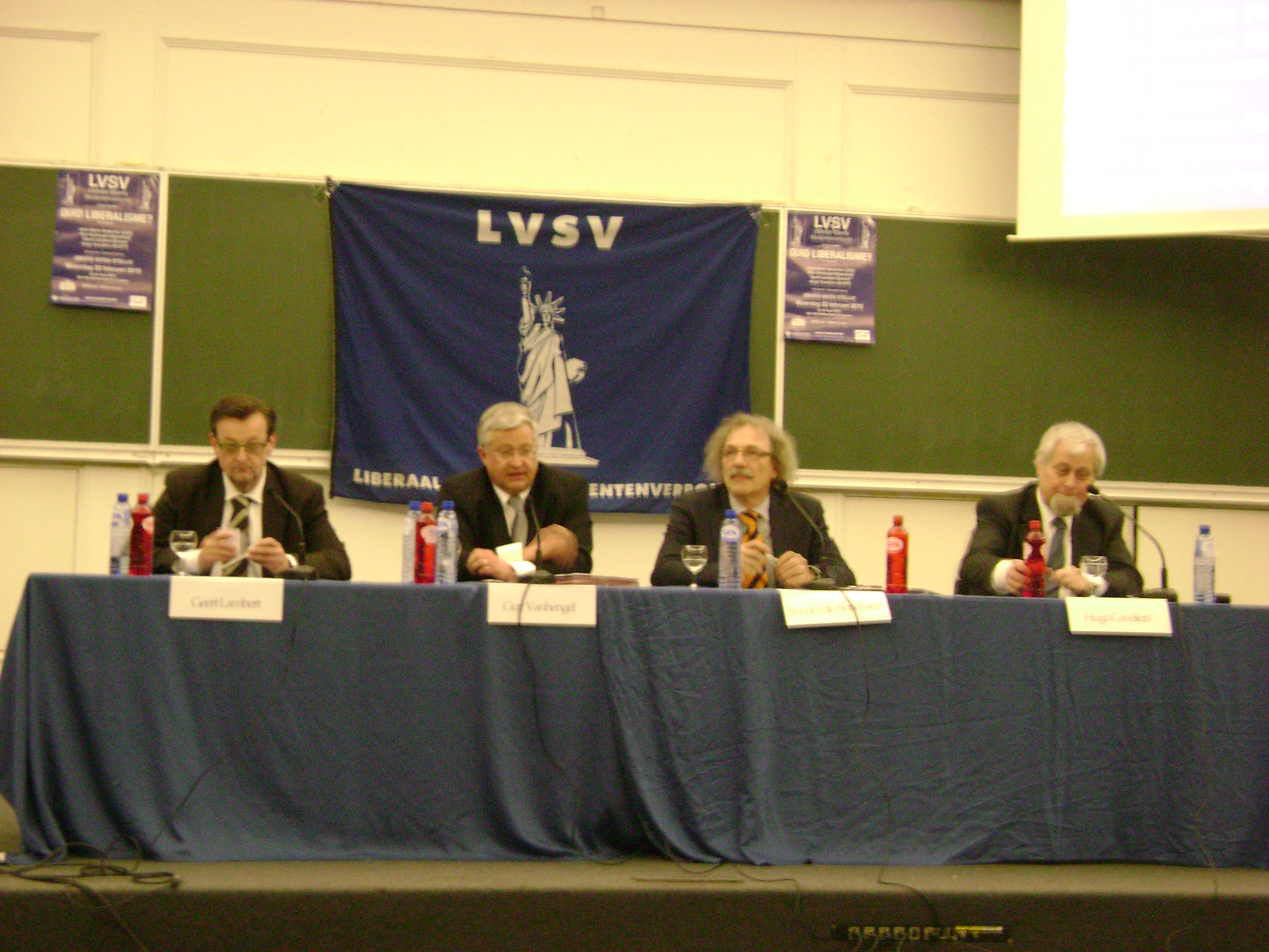 LVSV-debat Leuven. Geert Lambert, Hugo Coveliers, Boudewijn Bouckaert, Guy Vanhengel.